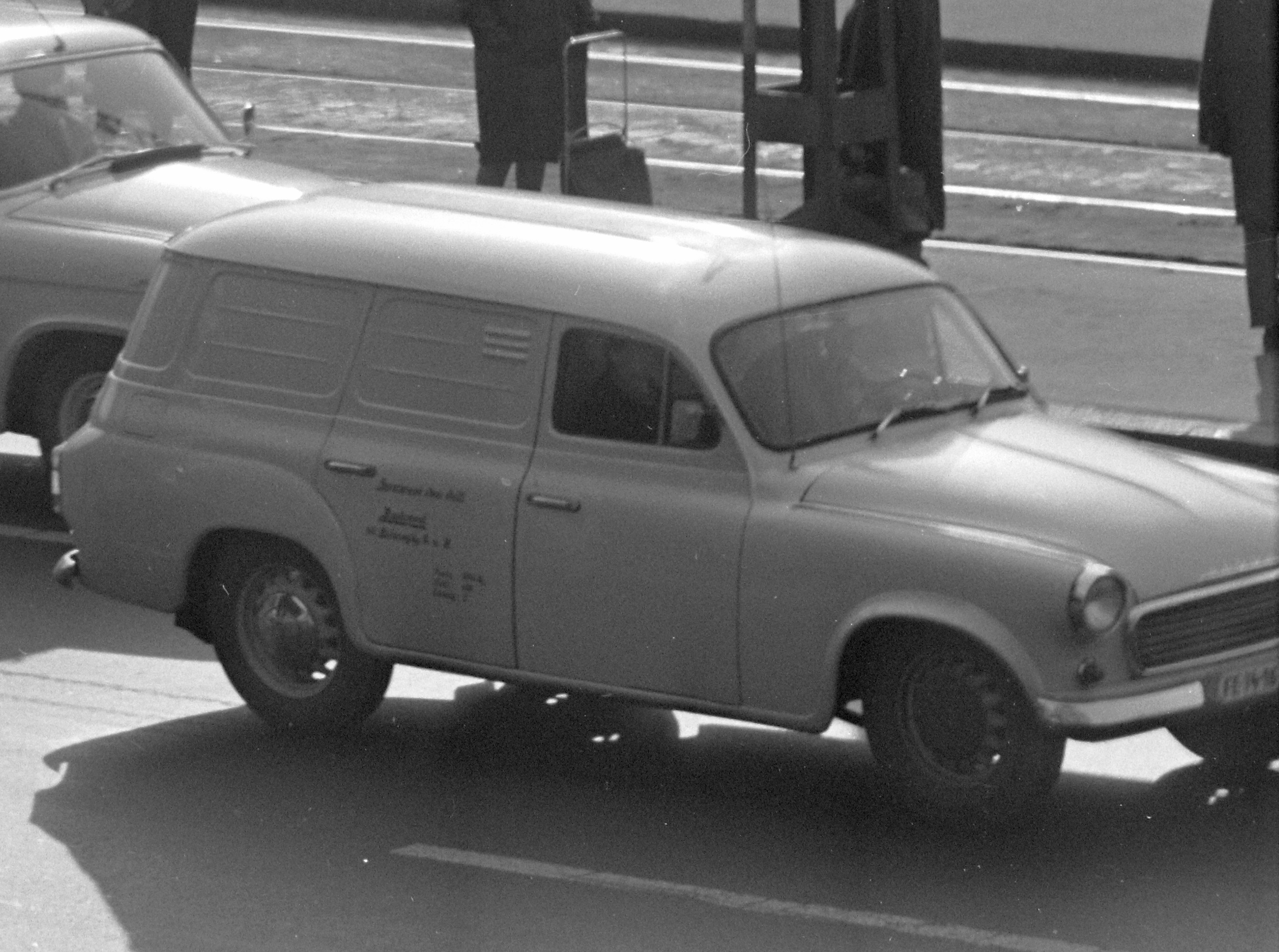 Károly (Tanács) körút, villamosmegálló a Madách Imre térnél. Location: Hungary, Budapest VII., Budapest V. Tags: Budapest Title: Károly (Tanács) körút, villamosmegálló a Madách Imre térnél.